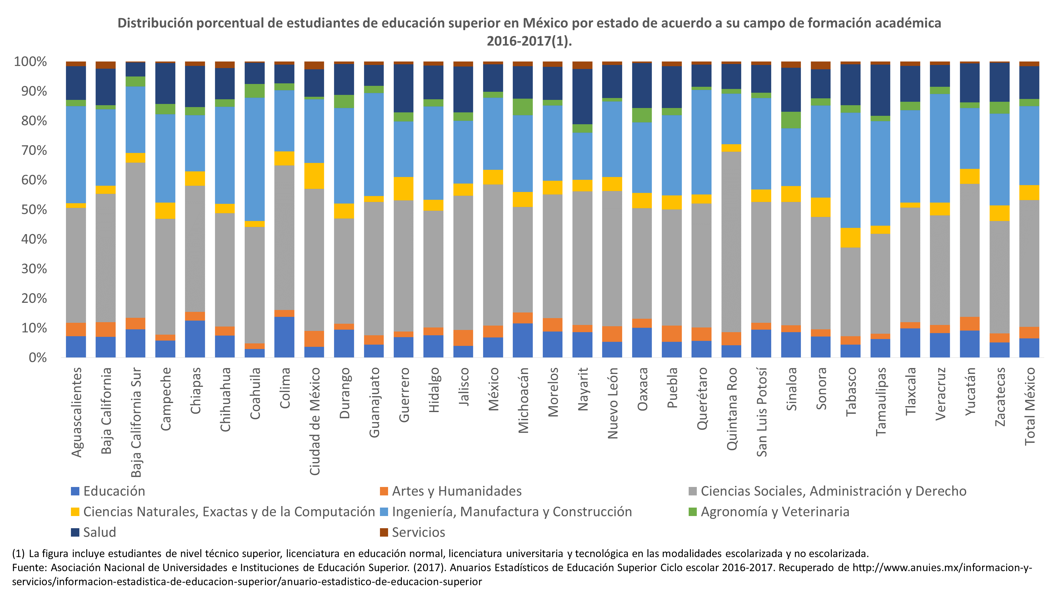 Distribución porcentual de estudiantes de educación superior en México por estado de acuerdo a su campo de formación académica 2016-2017.